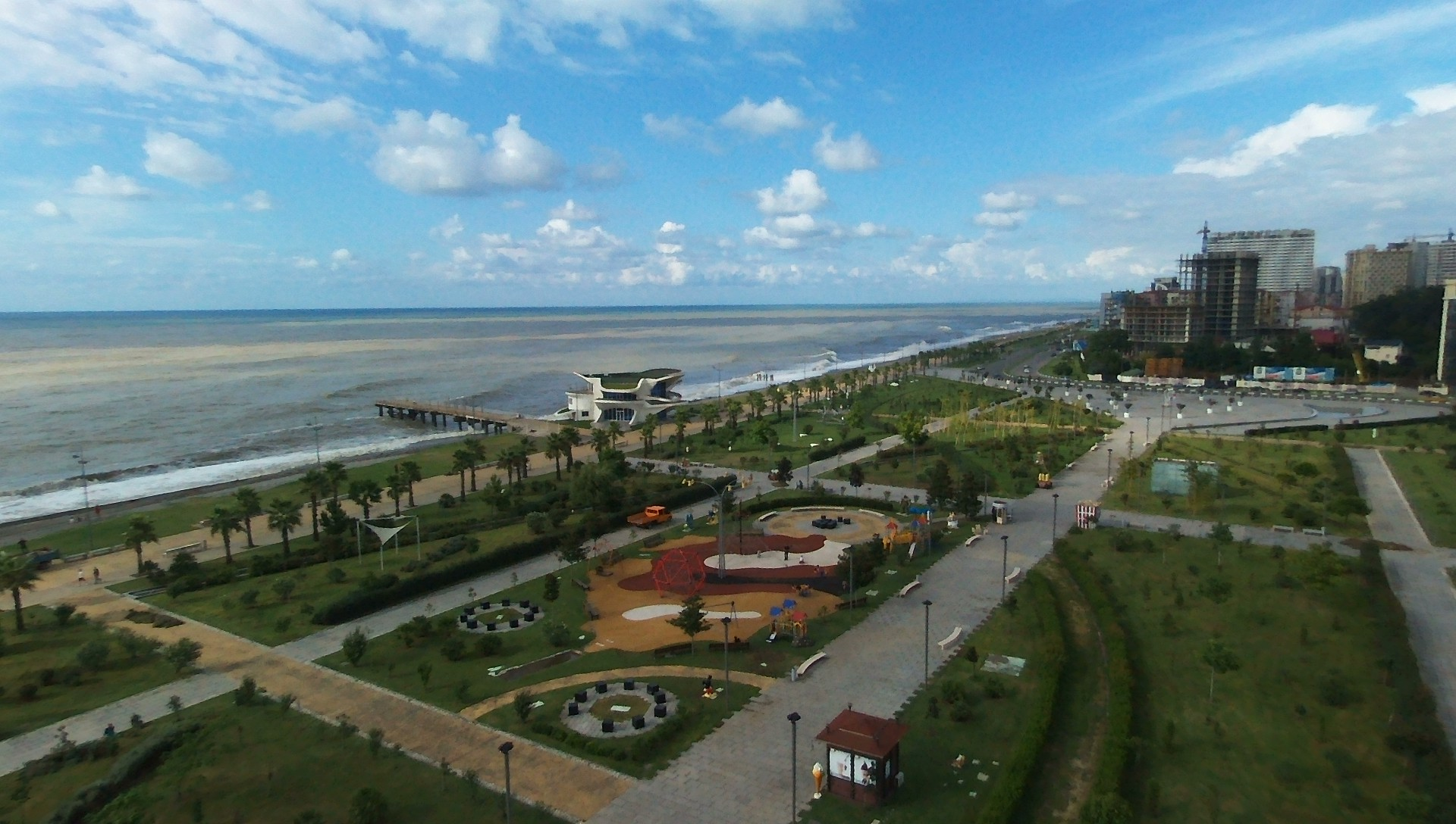 Ten materiał wykonano dronem Parrot Bebop Drone dzięki współpracy z firmą Parrot Polska.Materiały wykonane tym sprzętem możesz zobaczyć w kategorii: Taken with Parrot Bebop Drone. English | polski | +/− The making of this document was supported by Wikimedia Polska. To zdjęcie zostało wykonane podczas Wikiwyprawy 2015.Wszystkie zdjęcia z wyprawy możesz zobaczyć w kategorii: Wikiwyprawa 2015. English | polski | +/− To zdjęcie zostało załadowane dzięki współpracy z firmą Hyperbook. polski | +/− To zdjęcie zostało załadowane dzięki współpracy z firmą: Kopex Group. English | polski | +/−